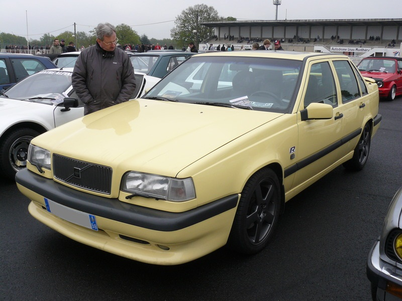 Français cadien: Montlhery Avril 2012